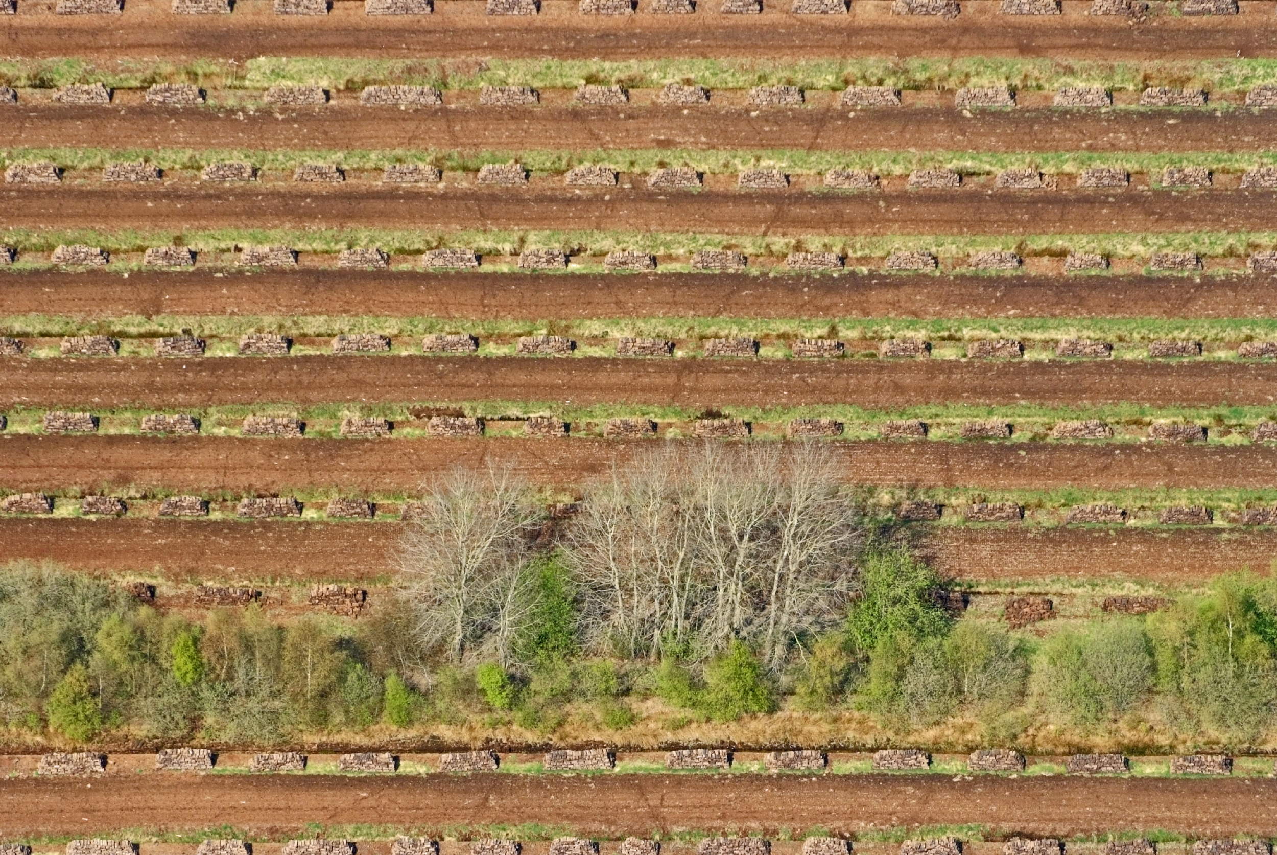 Gestochener Torf in Südmoslesfehn (Landkreis Oldenburg) (Fotoflug von Nordholz-Spieka nach Oldenburg und Papenburg)